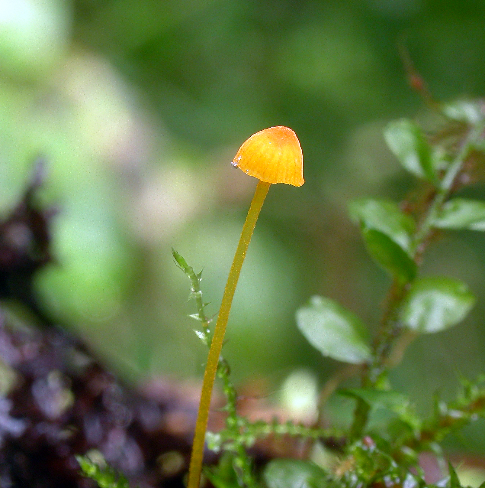 Sopparten kromgul bregnehette (Mycena oregonensis).